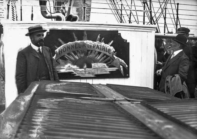 Docteur Charcot [15 août 1908] (photographie de presse)